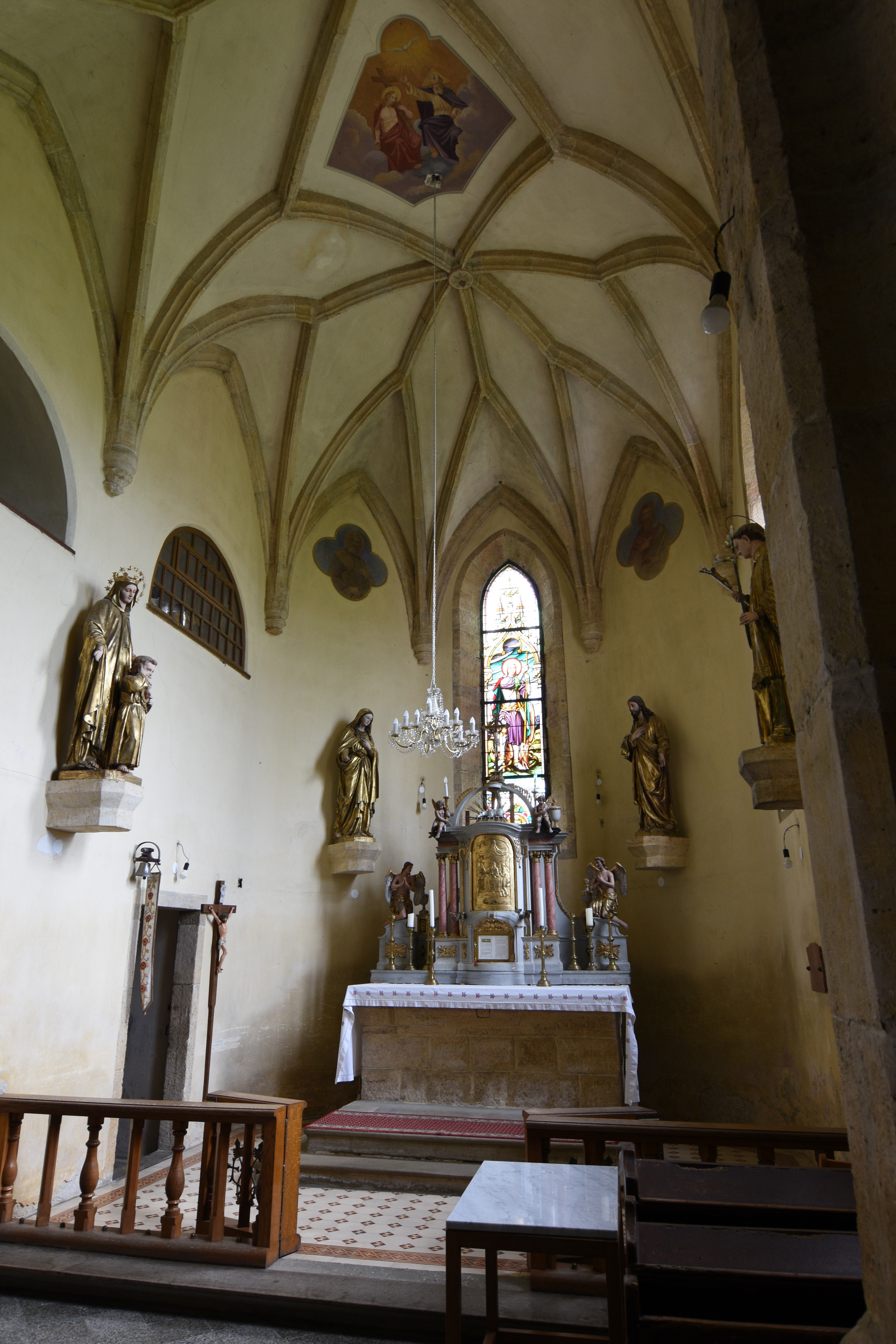 Cerkev sv Jurija Videm Interior